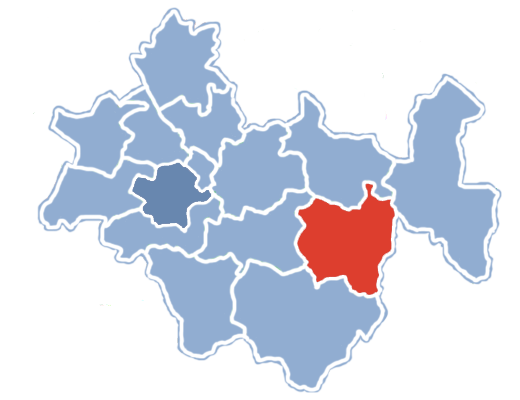 Położenie gminy Wielgomłyny na terenie powiatu radomszczańskiego.